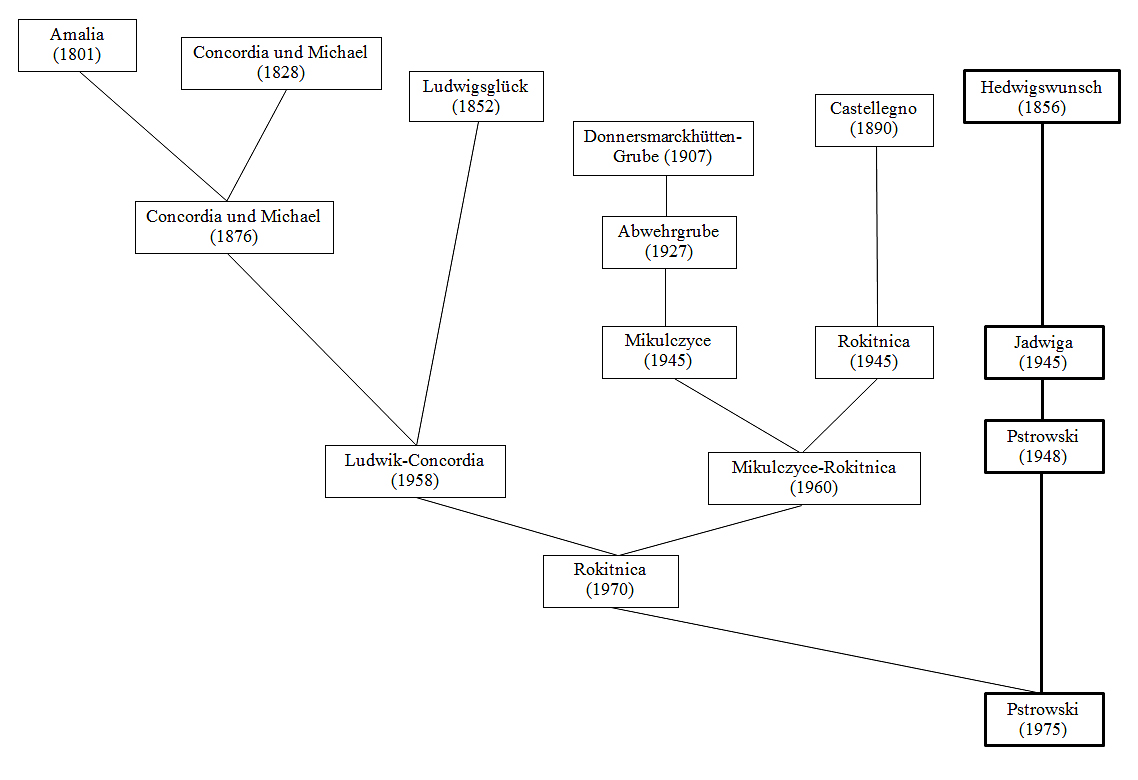 Abstammung des Bergwerks Pstrowski